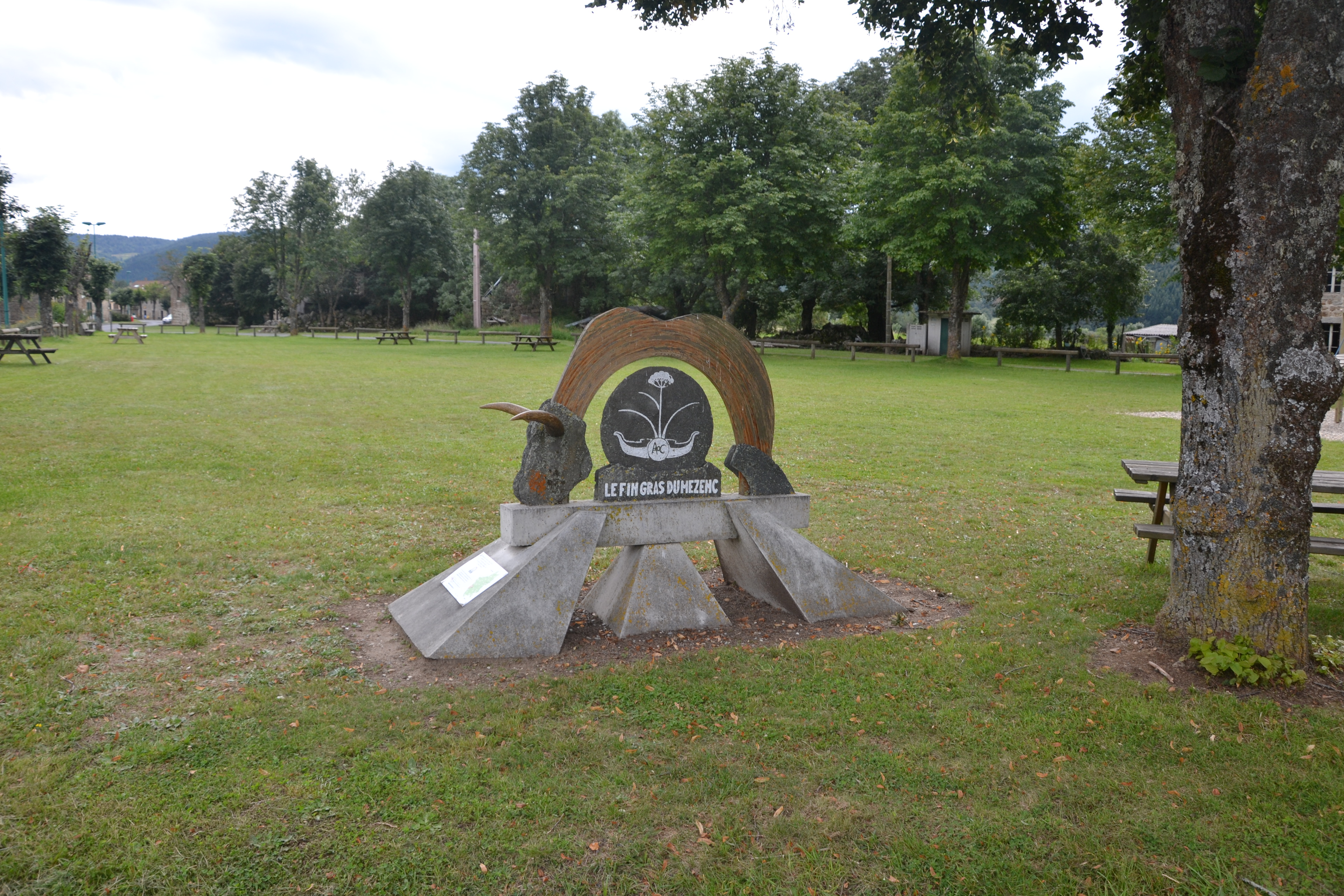 statut à Issarlès